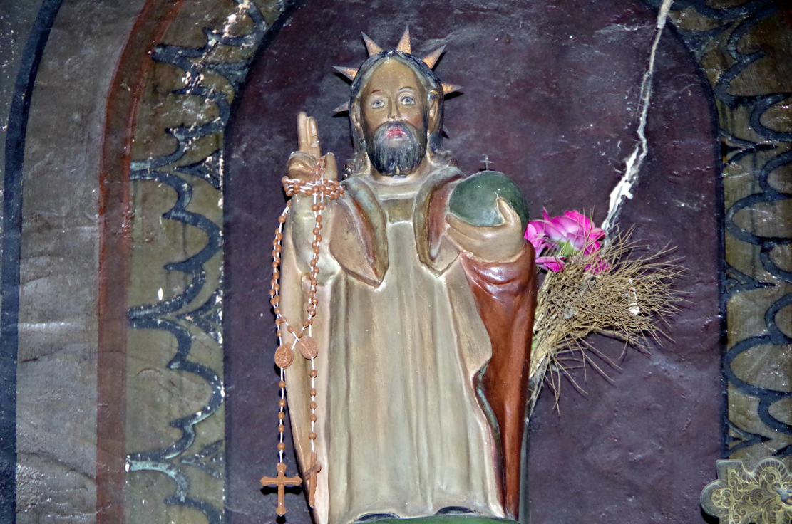 Imatge moderna, de fusta, de Sant Salvador del Bosc, Llimiana, a l'obaga del Montsec de Rúbies.